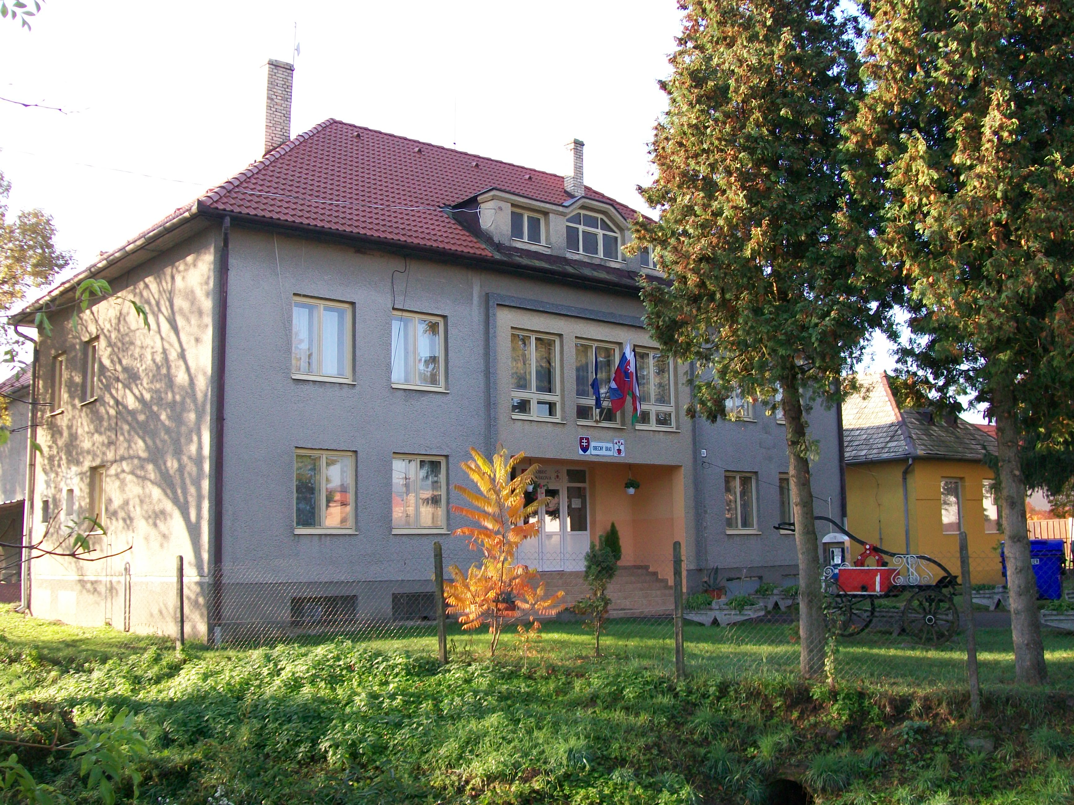 Obecný úrad v Maškovej, okres Lučenec